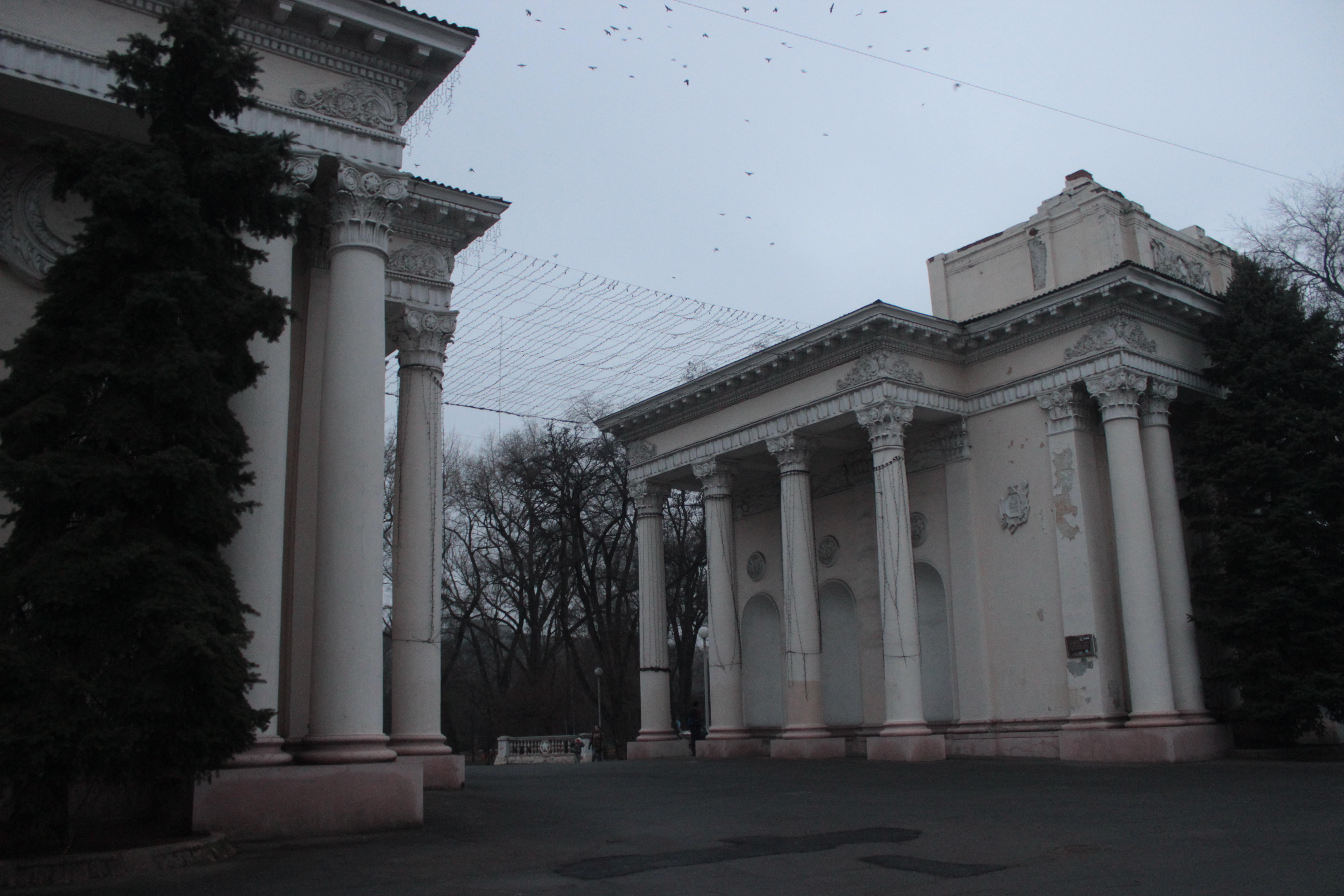 Парк ім. Чкалова, м. Дніпропетровськ, Пр. Карла Маркса,96